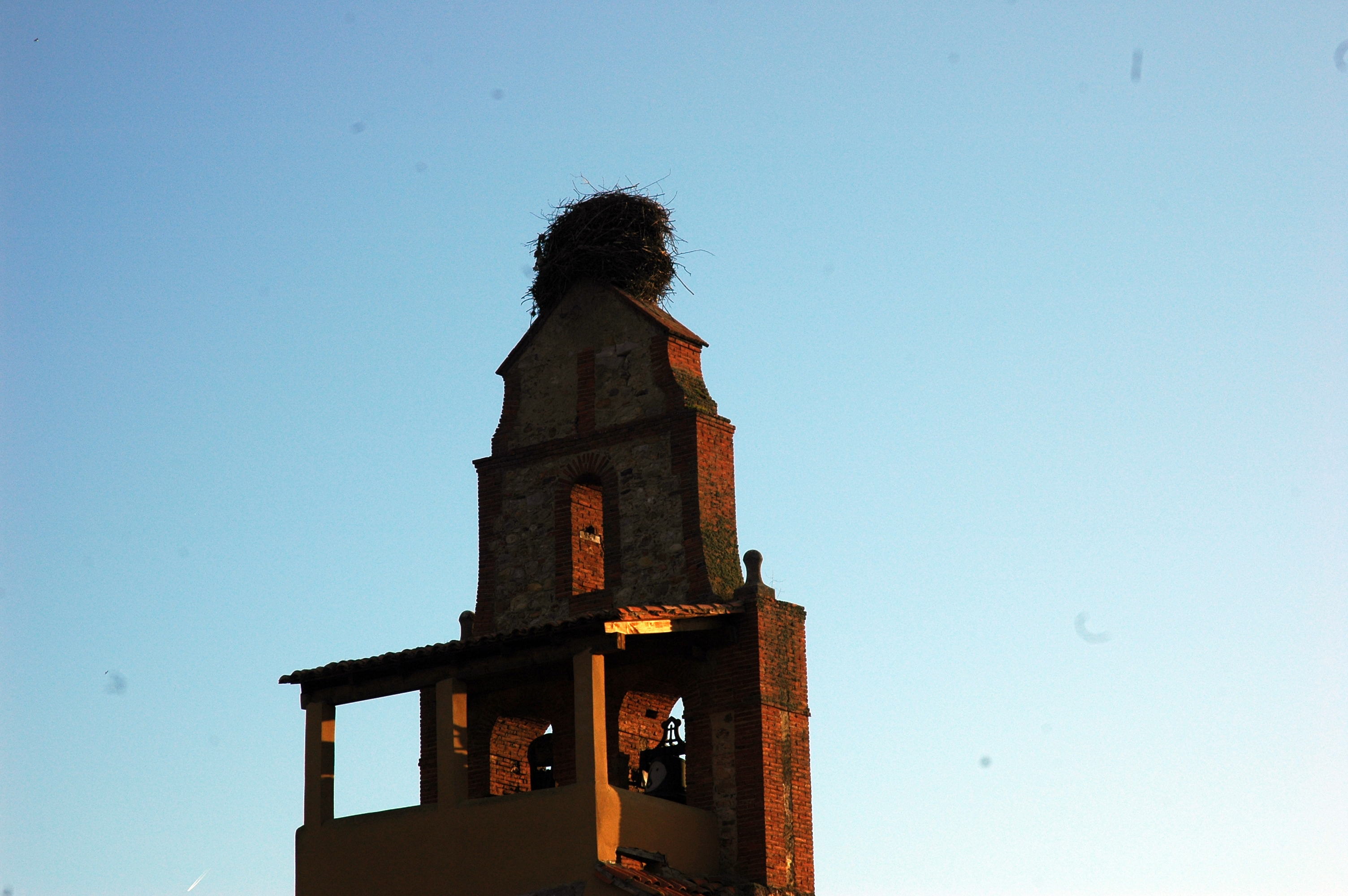 Campanario de la Iglesia de Santiago del Molinillo, al atardecer de un dia de primavera. Destaca el nido de Cigueña, que no falta en cada iglesia de los pueblos de España